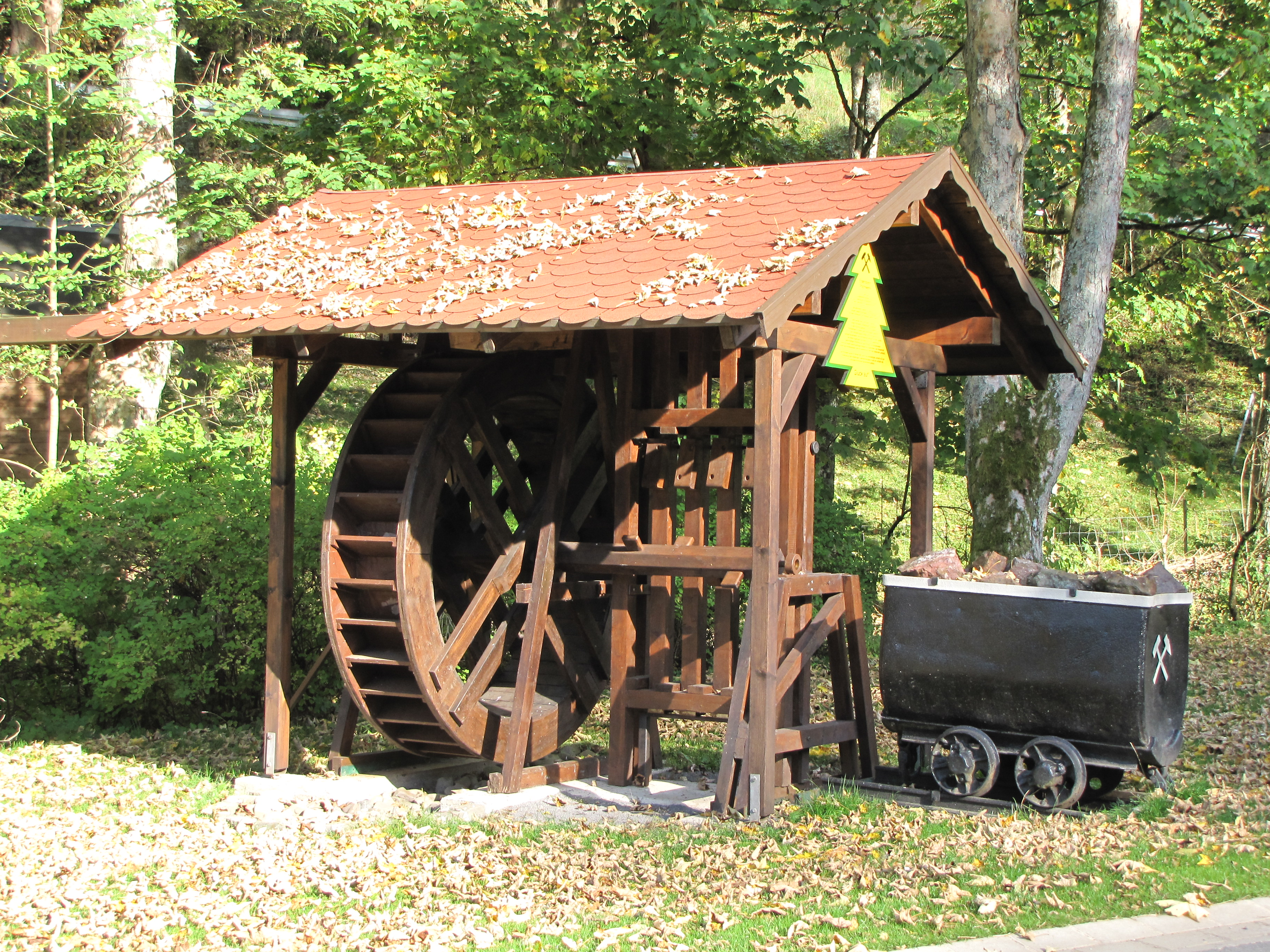 Modell eines Oberharzer Pochwerks am nördlichen Ortseingang von Lerbach, einem Ortsteil von Osterode